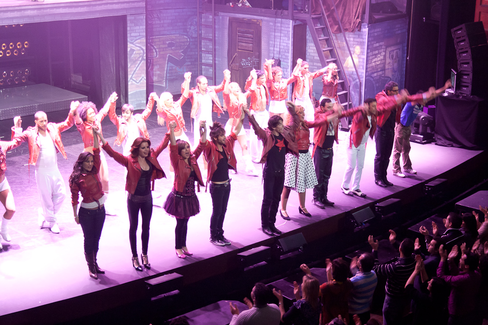 Musical "Hoy no me puedo levantar" en la gira celebrada en el teatro Villamarta de Jerez de la Frontera.